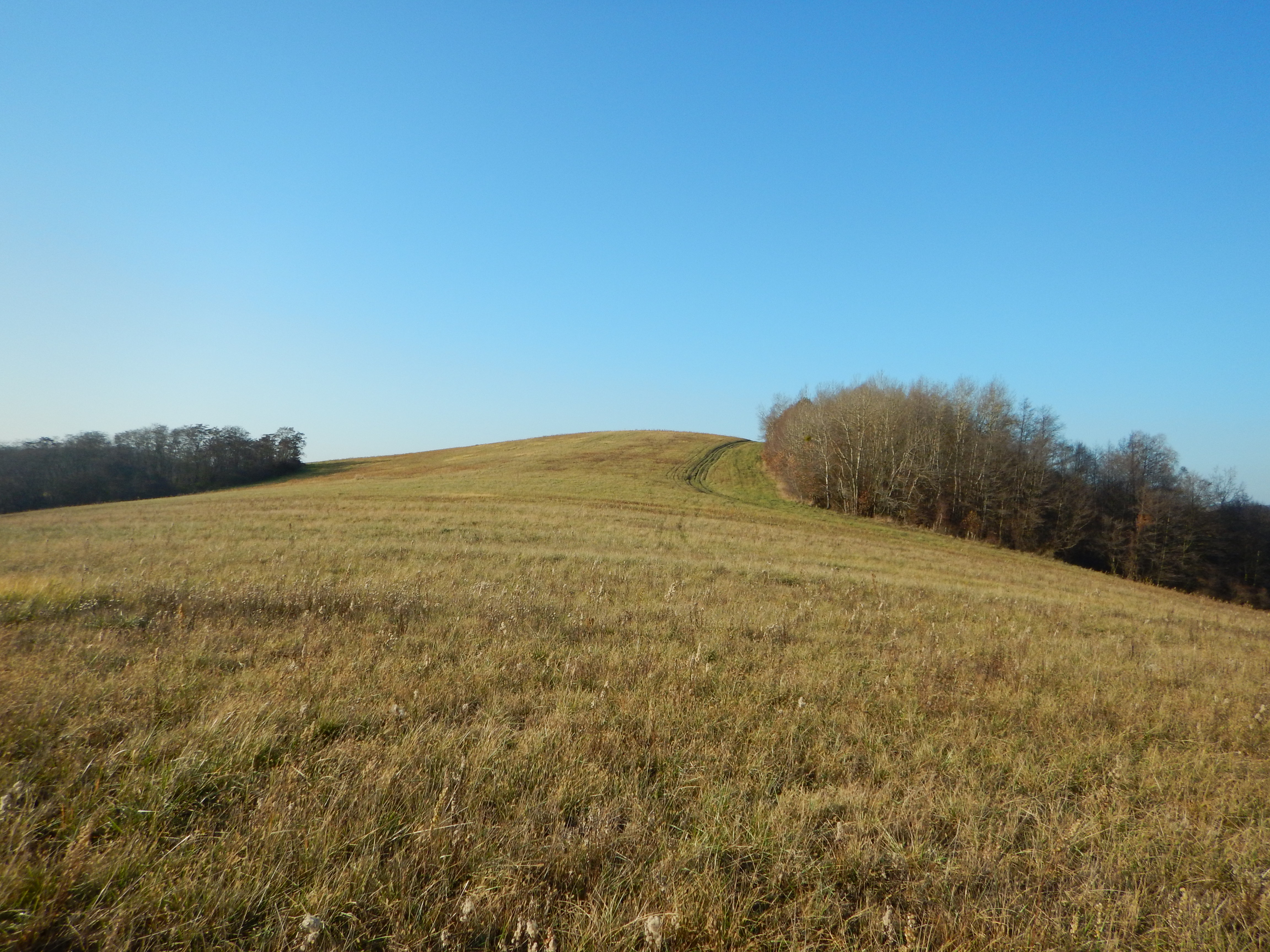 Rimákov Vrch (308 m n. m.) 49°0'22"N, 22°3'57"E